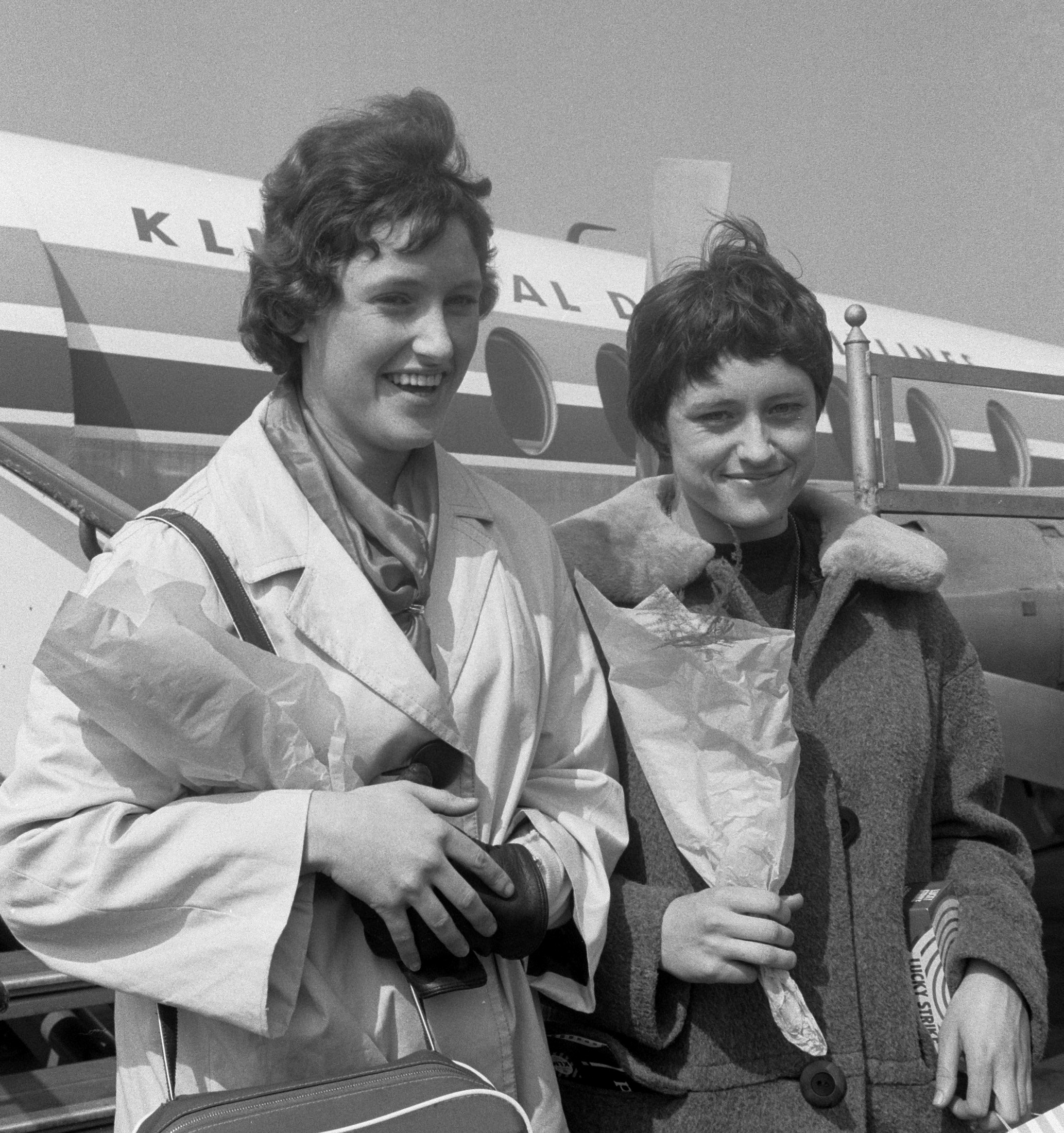 Aankomst schoonspringsters Thea en Judith du Pon op Schiphol.